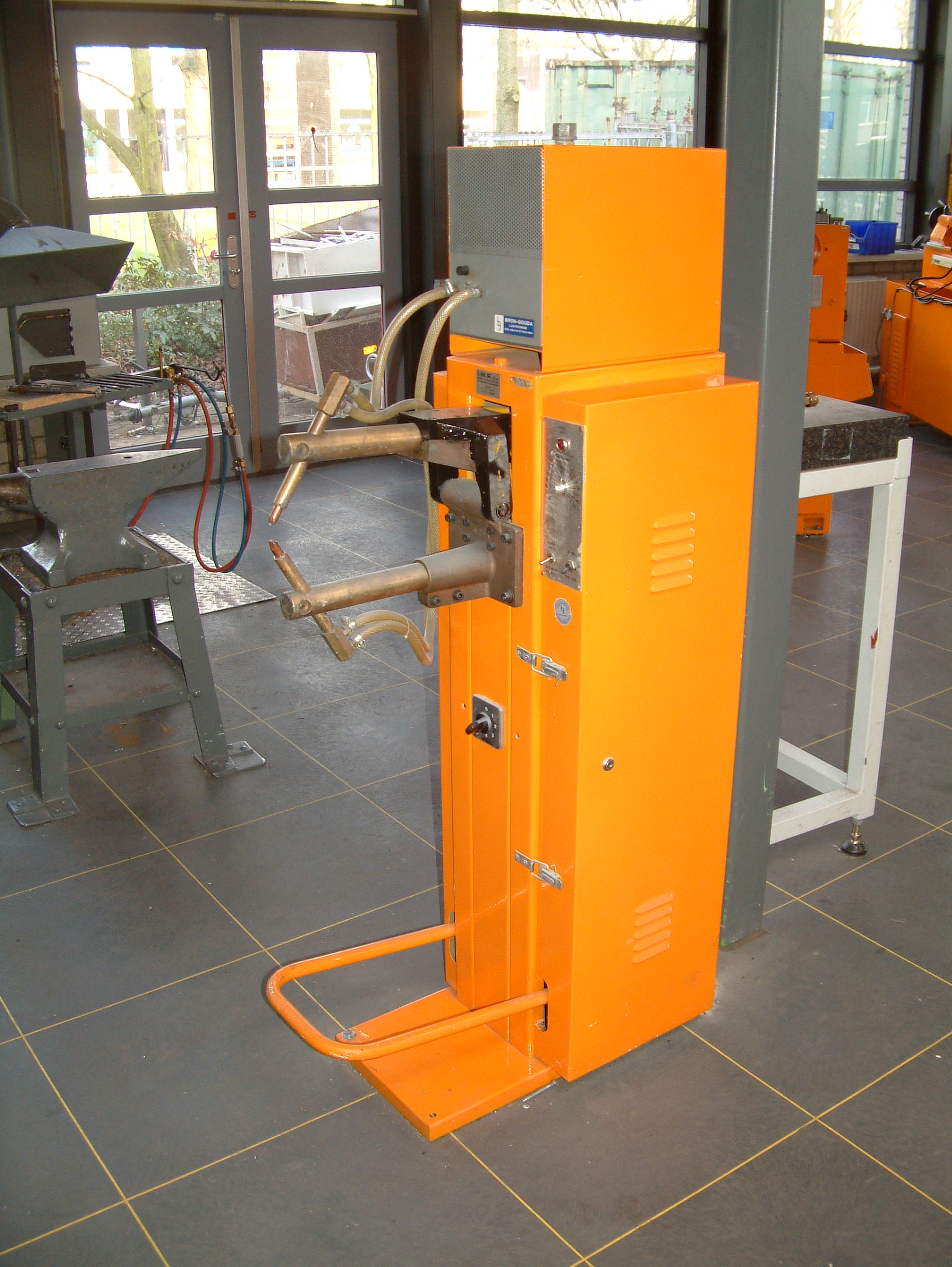 ONC Zoetermeer Puntlasmachine